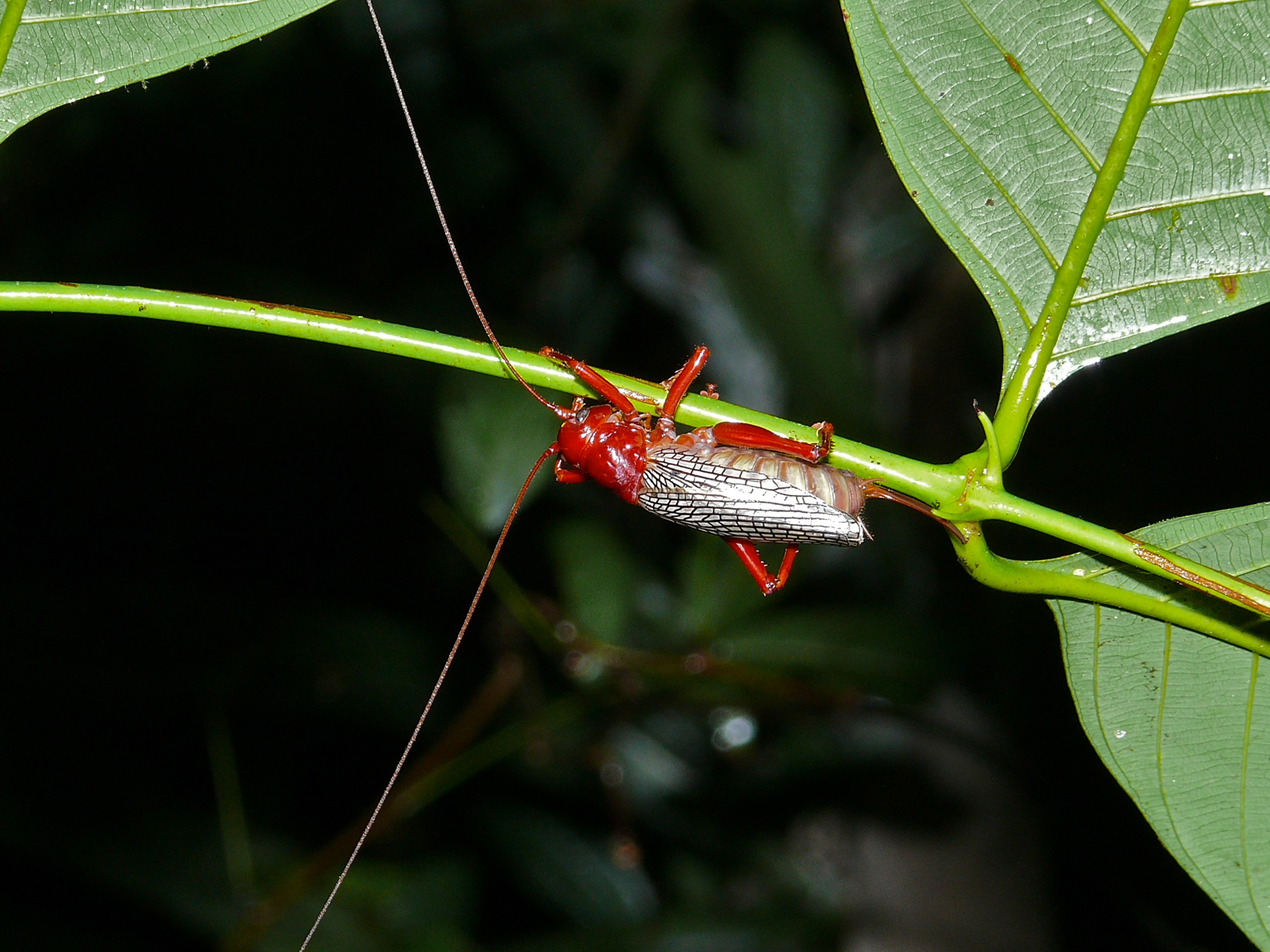 Gunung Mulu NP, Sarawak, MALAYSIA